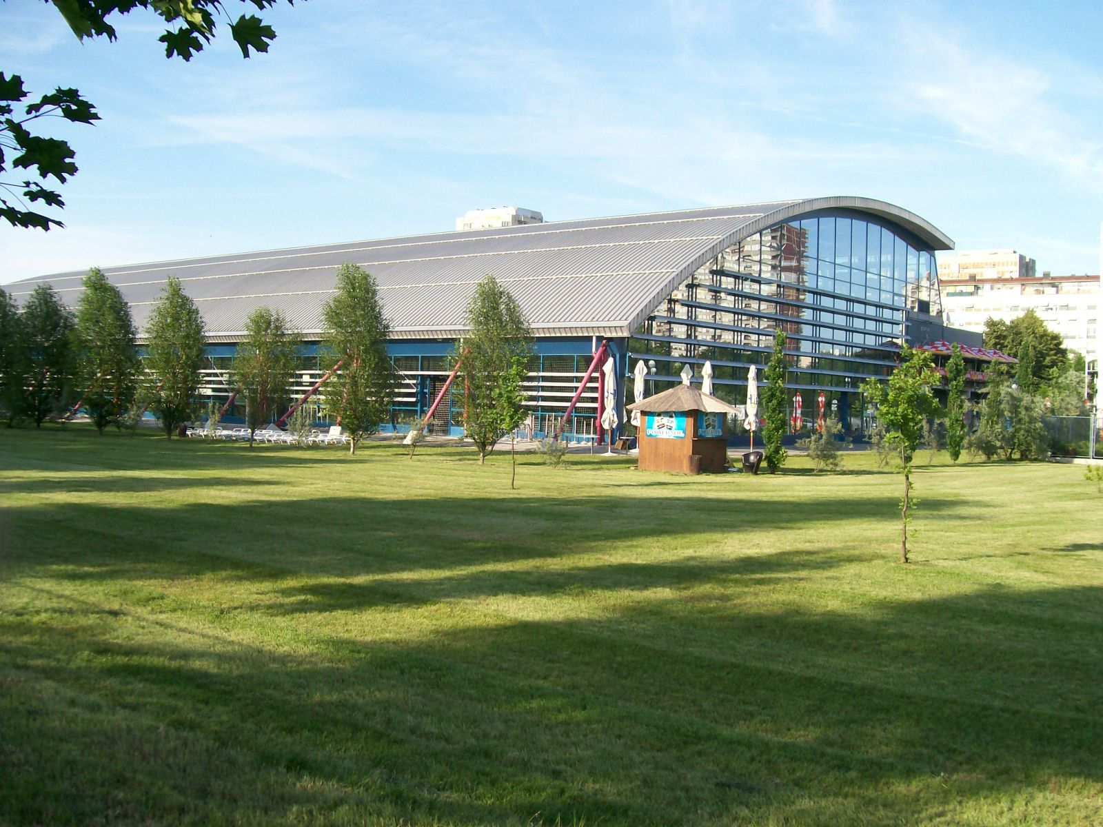 Bazen Utrine, Zagreb